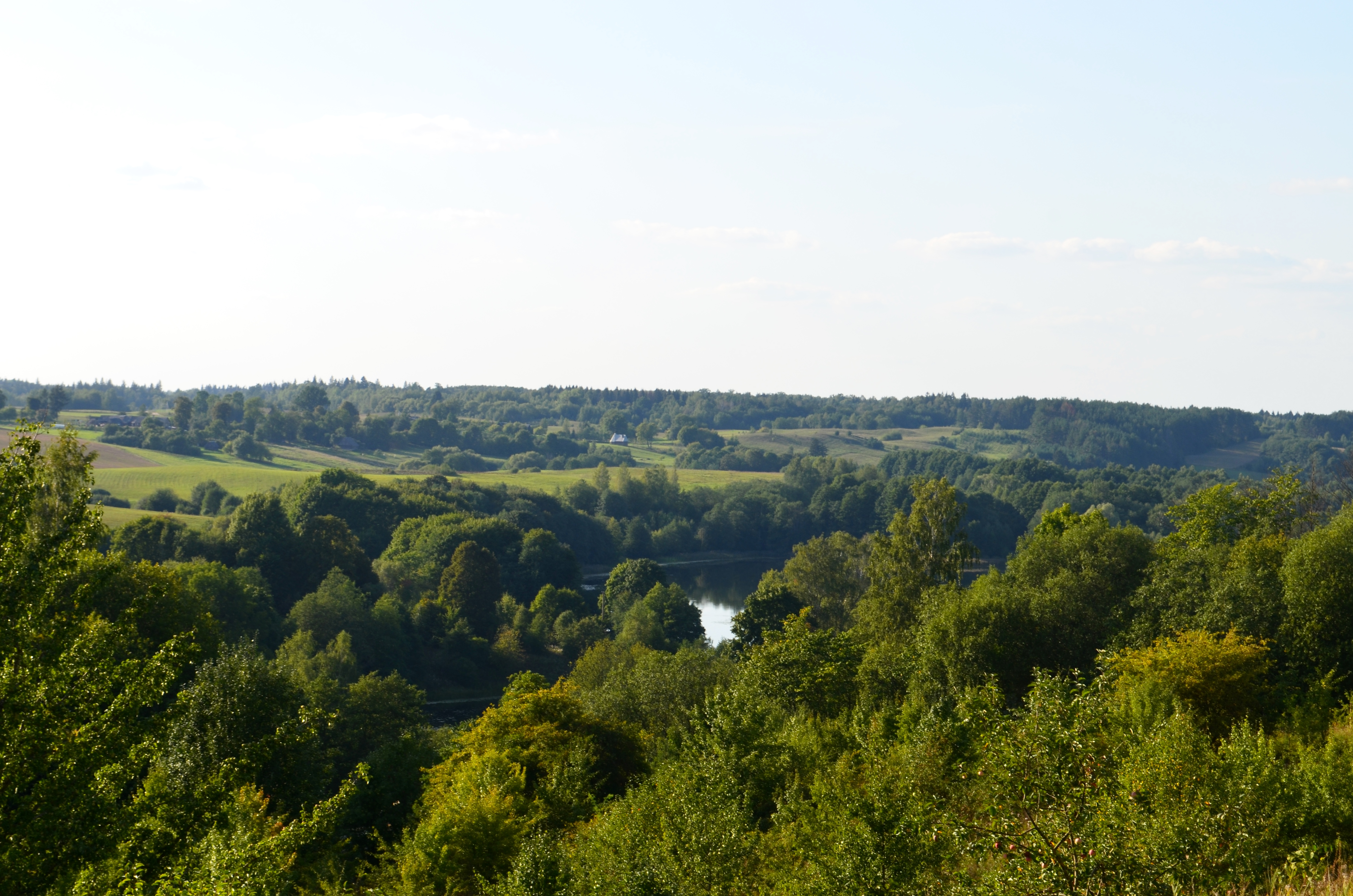 Strėvio ežeras (Bagdononių tvenkinys), Aukštadvario RP, Trakų raj.